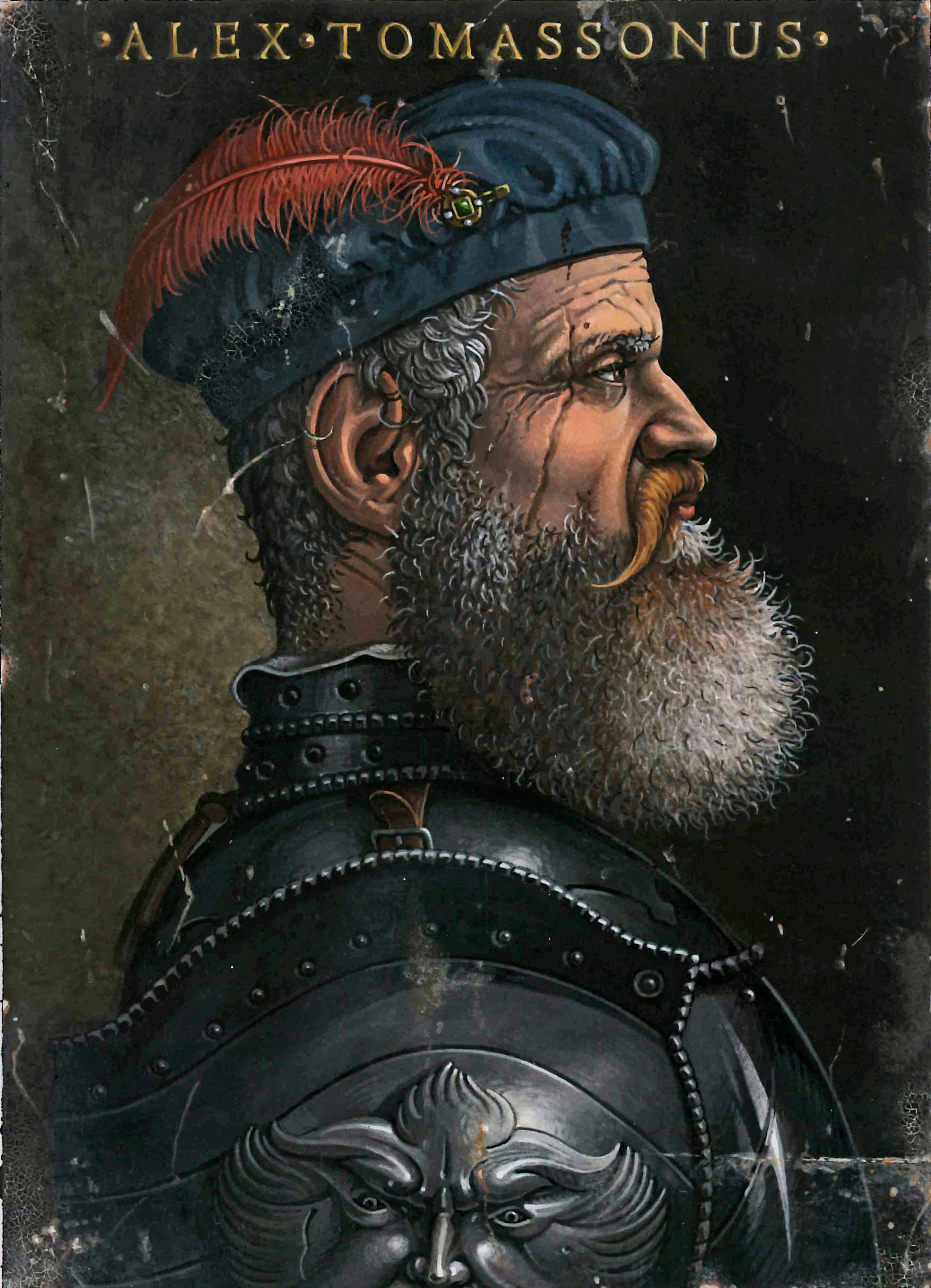 Ritratto di Alessandro da Terni (Giosuè Tacconi, 25 Agosto 2017)